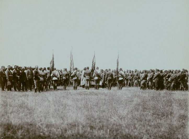 Освещаване на бойните знамена на Седемнадесети пехотен доростолски полк при Чаталджанските позиции.